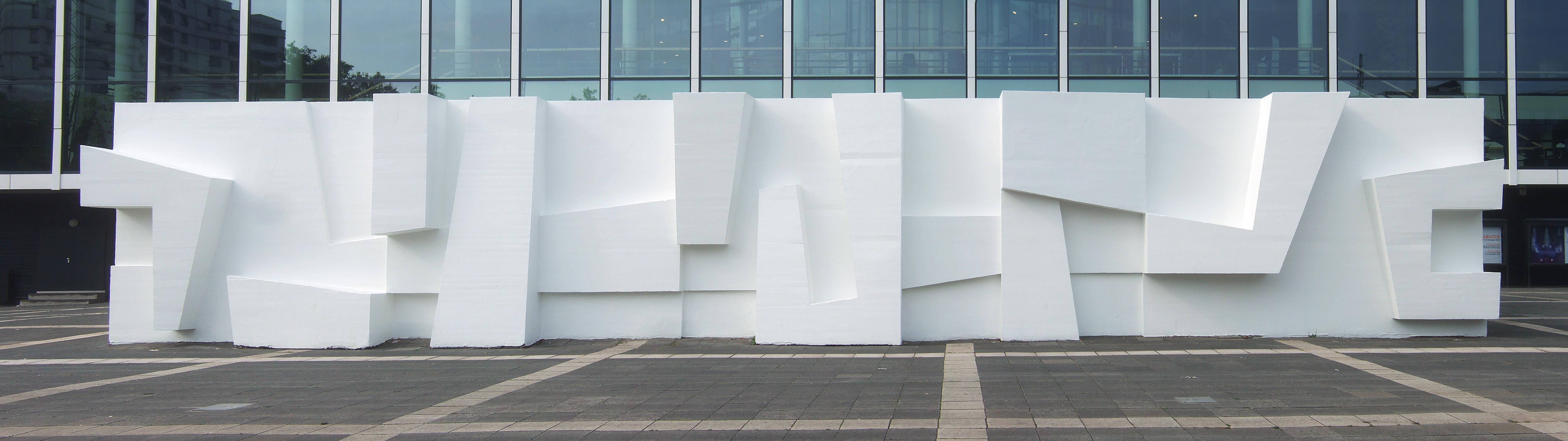 Plastik von Robert Adams am Eingang des Musiktheaters im Revier in Gelsenkirchen. Foto: Jesse Krauß 2018